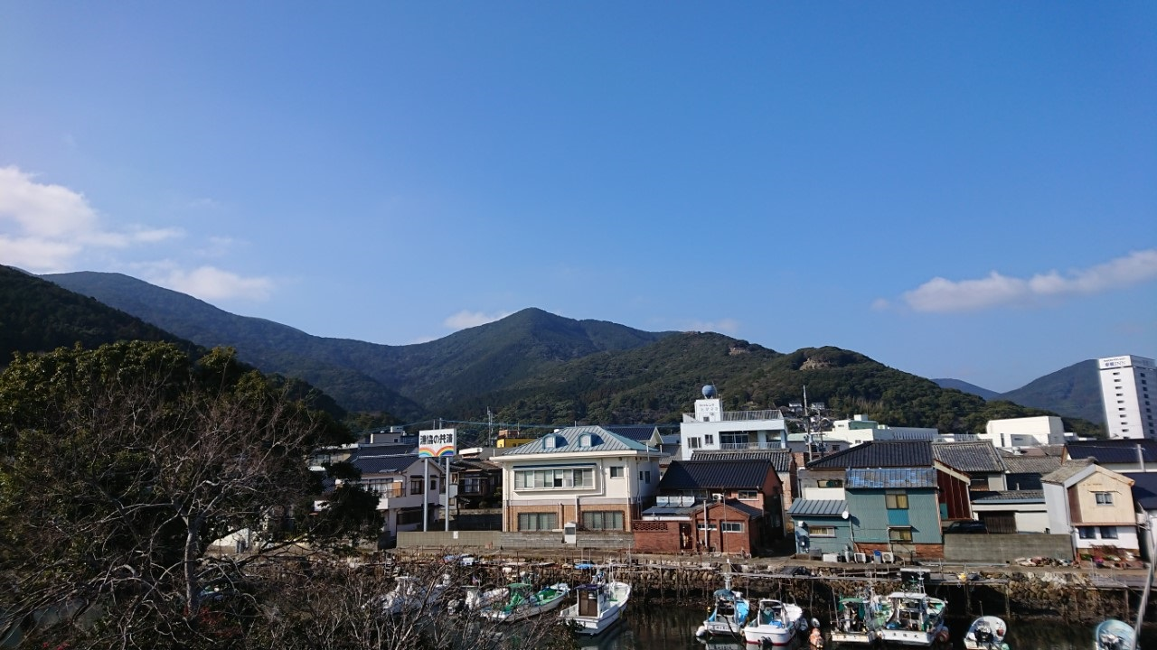 長崎県対馬市厳原町にある3つの山 厳原港厳原大橋から望む